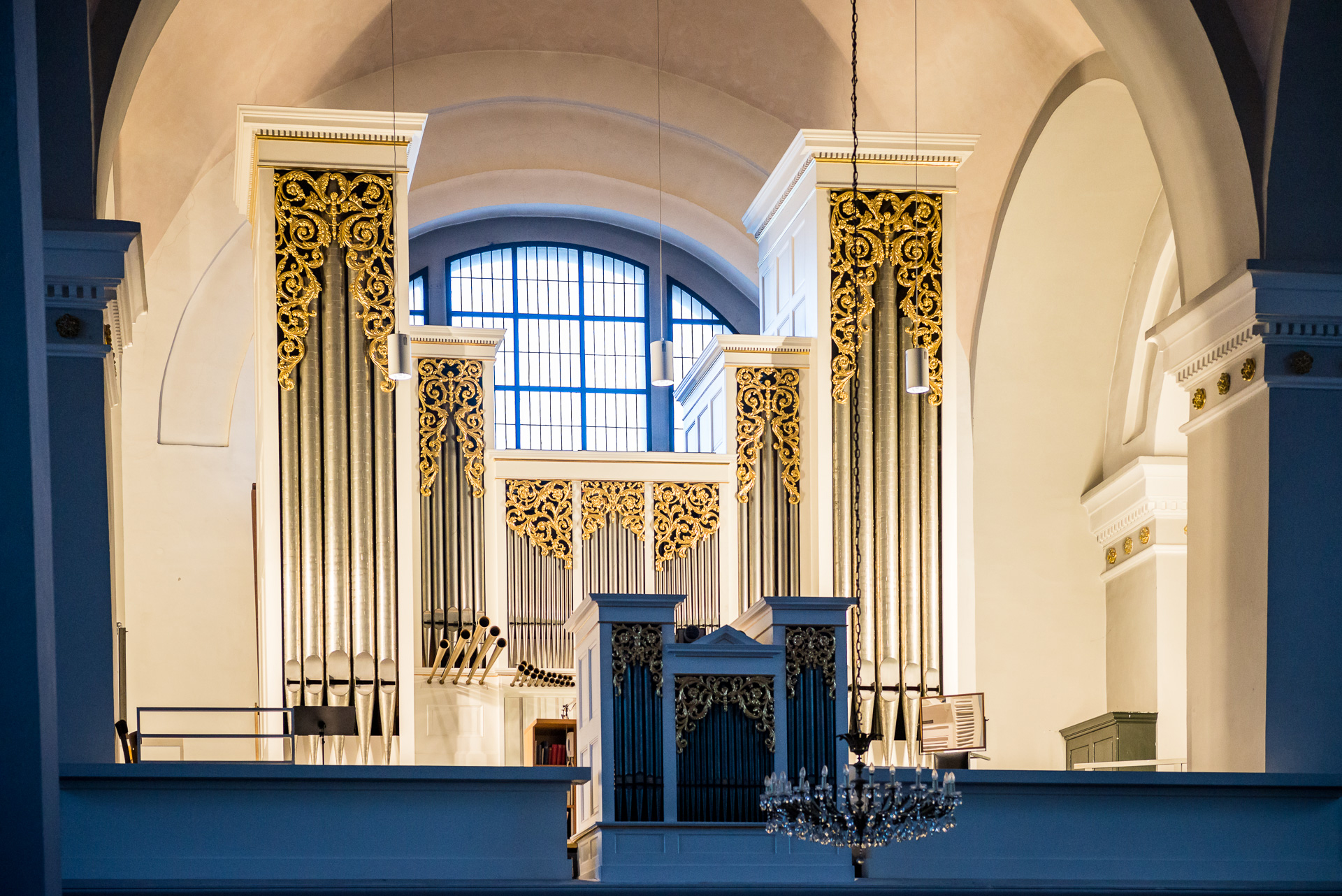 Prospekt der Seifert Orgel in St. Laurentius Wuppertal